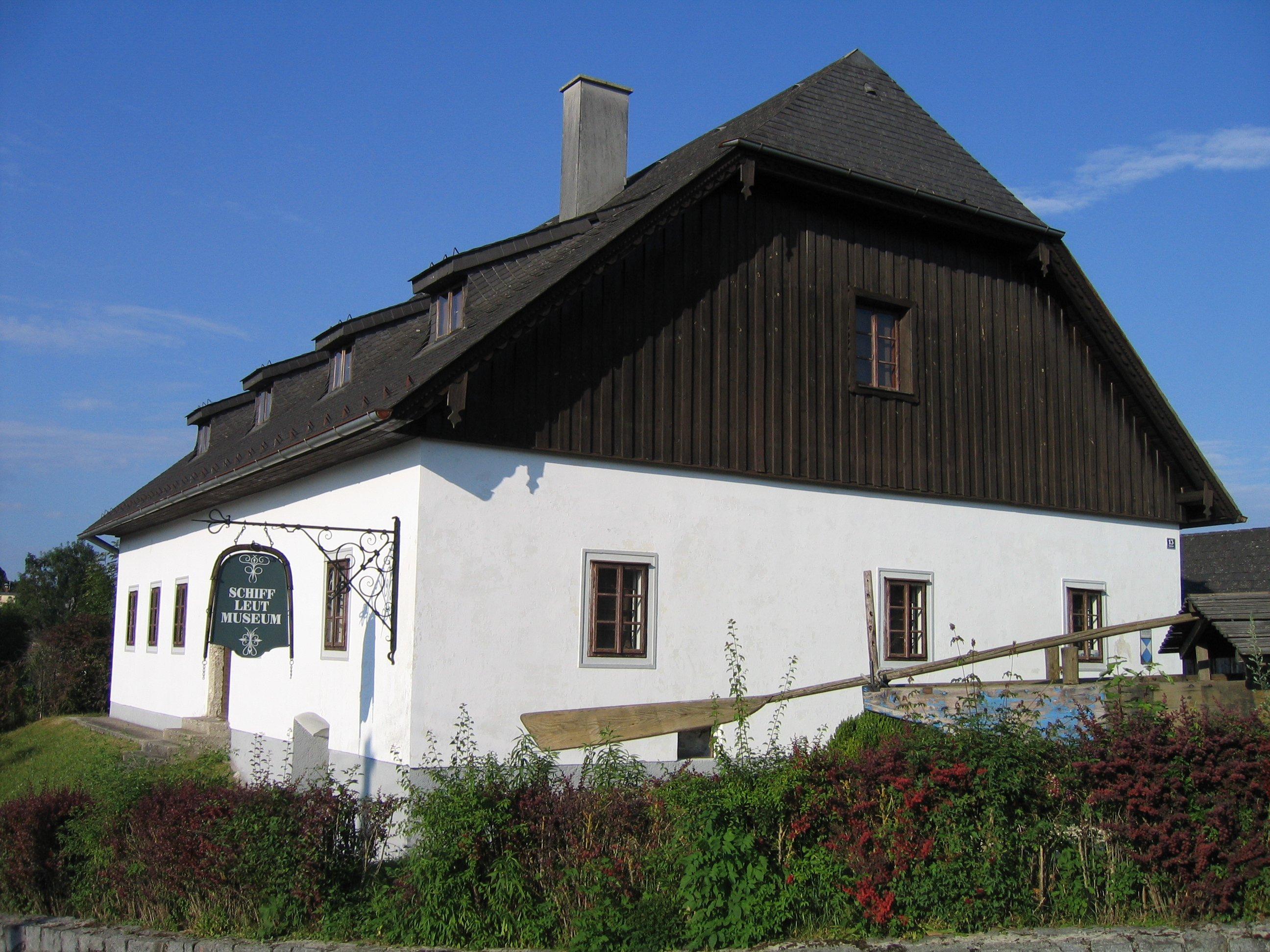 Schiffsleutmuseum der Marktgemeinde Stadl-Paura